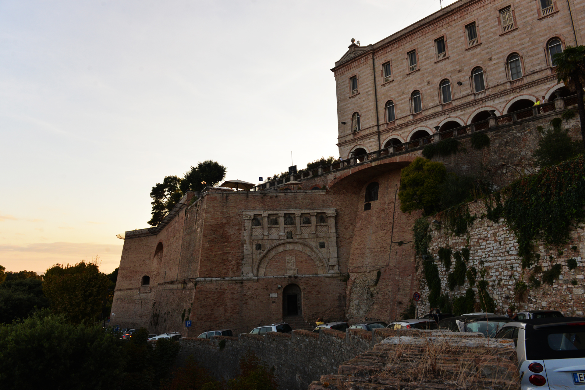 l'imponenza della Rocca Paolina che domina Perugia This is a photo of a monument which is part of cultural heritage of Italy.